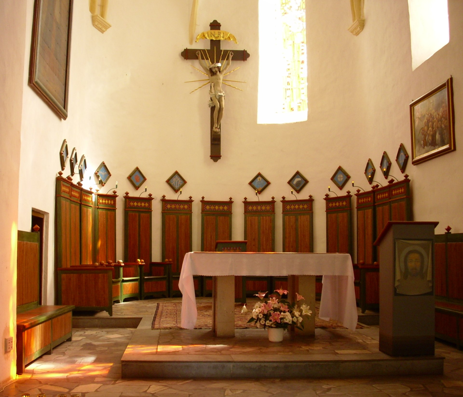 Kodeń. Wnętrze dawnej cerkwi zamkowej – ołtarz.